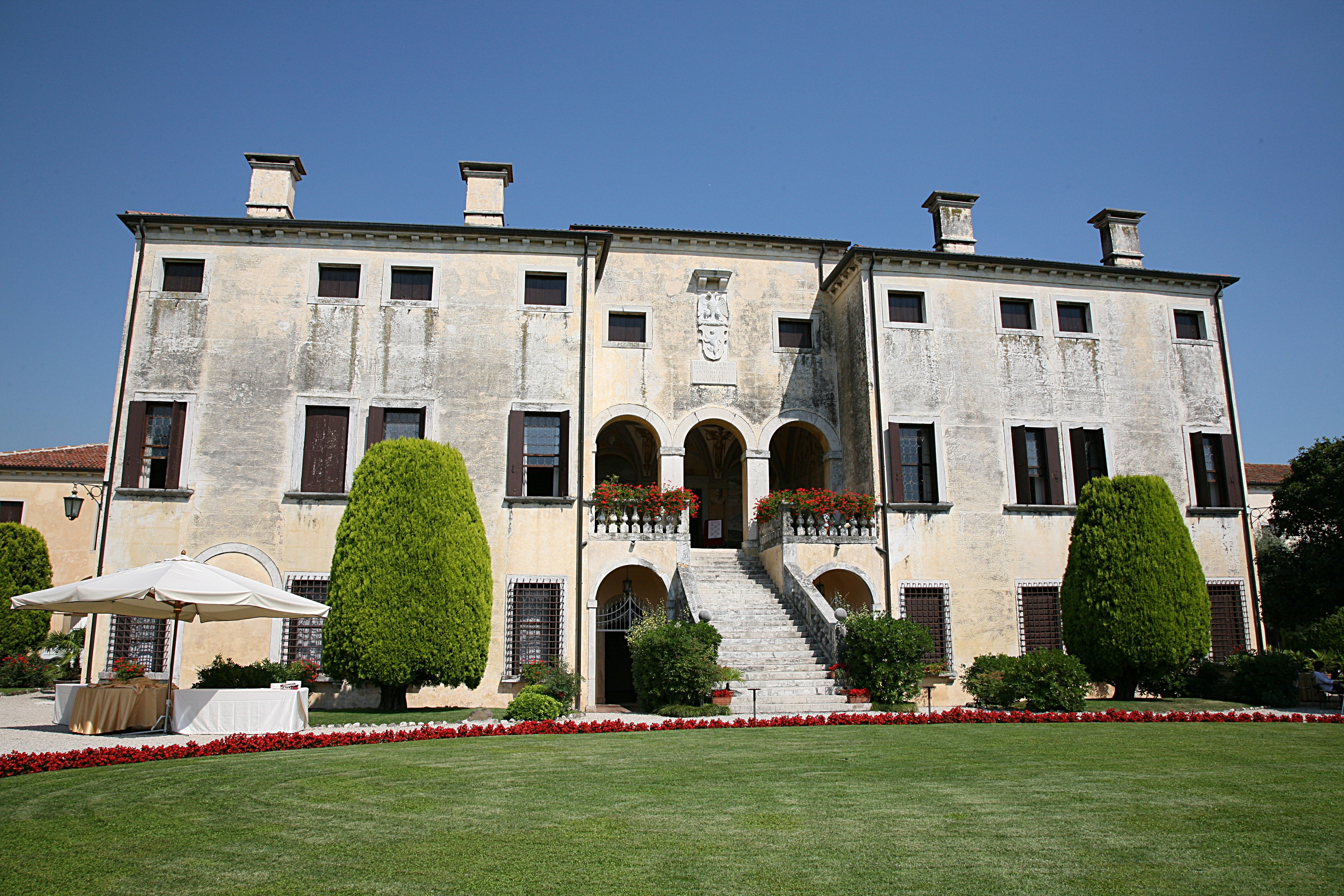 Villa Godi by Andrea Palladio.